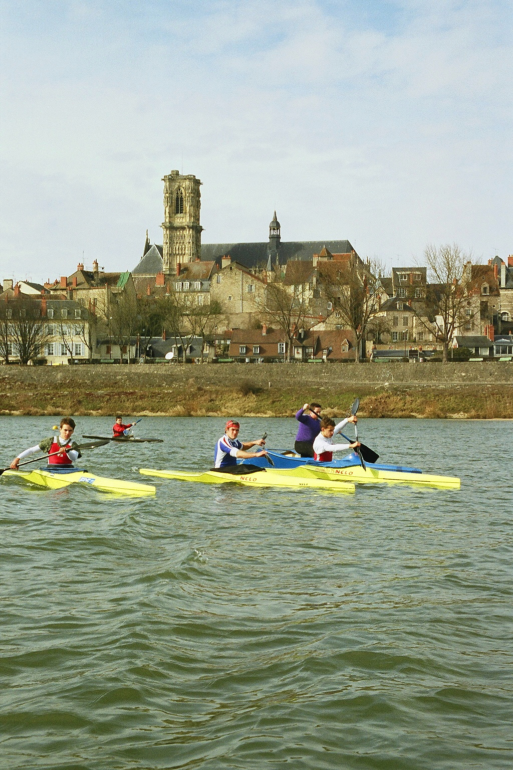 Canoë sur la Loire. Cliché publiable moyennant mention du crédit de la Ville de Nevers